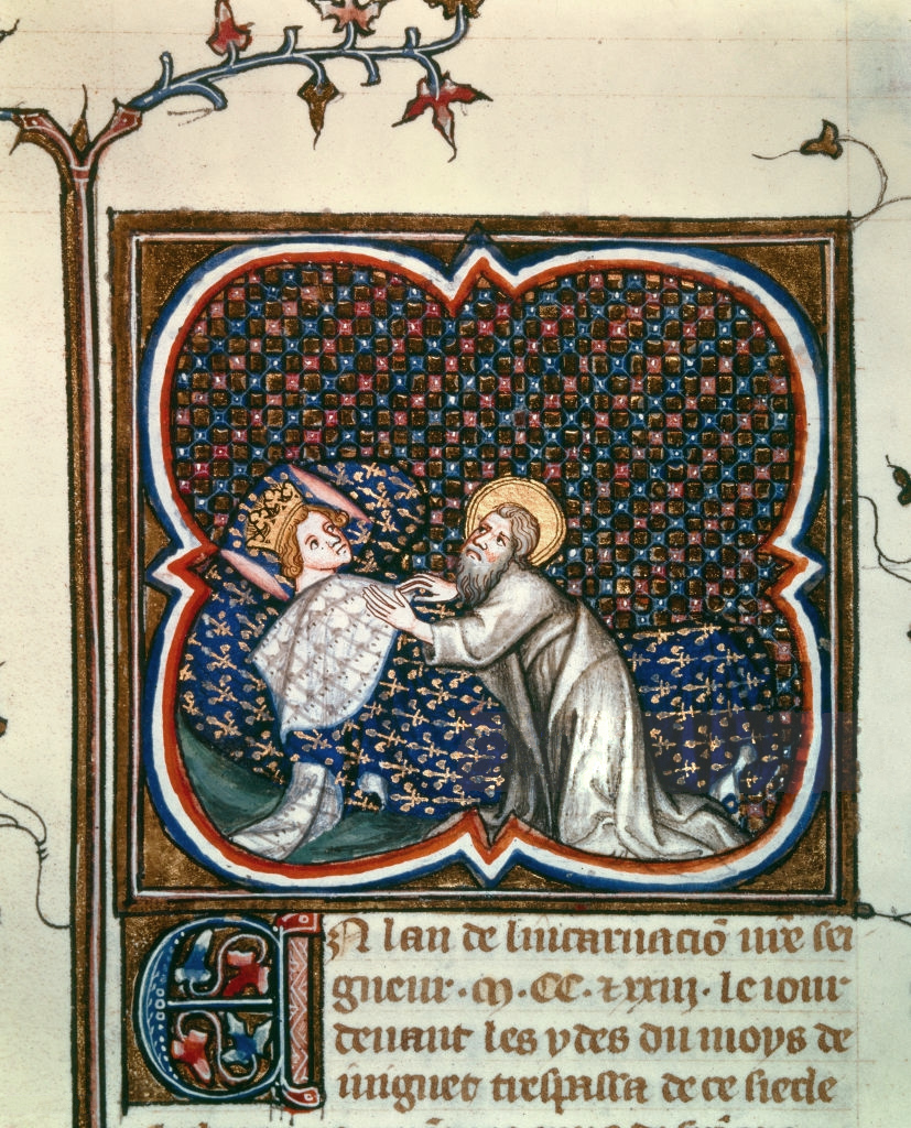 French School, Apparition of Saint Valery to Hugh Capet (941-996) Miniature from the Grandes Chroniques de France, Paris.